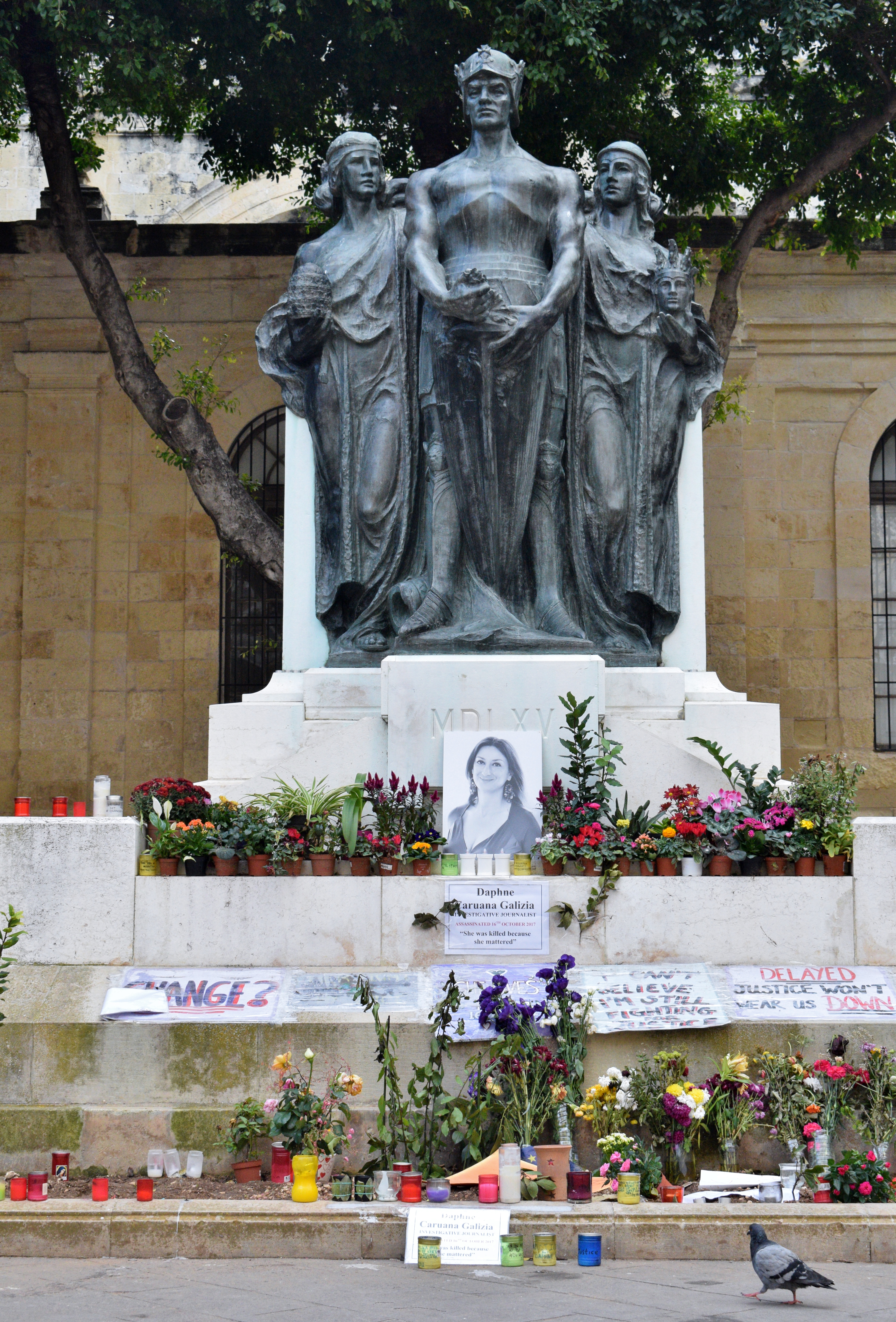 La Valletta. Malti: Il-Belt Valletta.